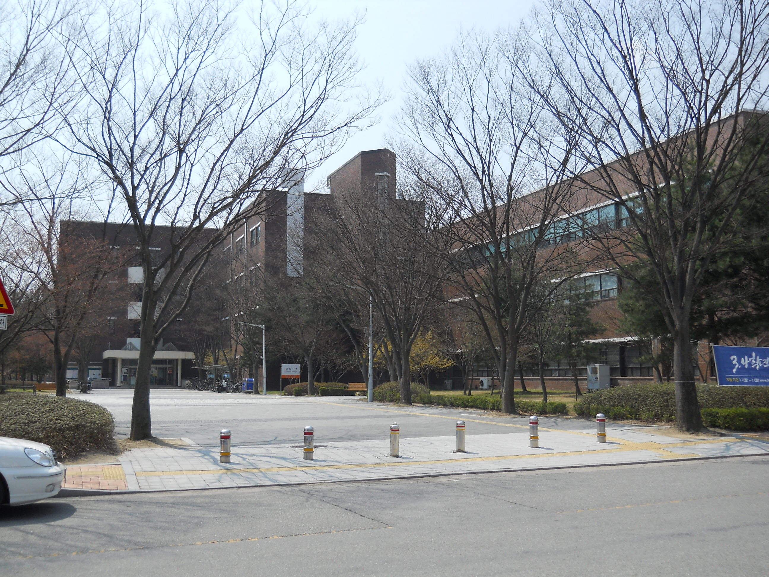 2015년 4월 공학 1관